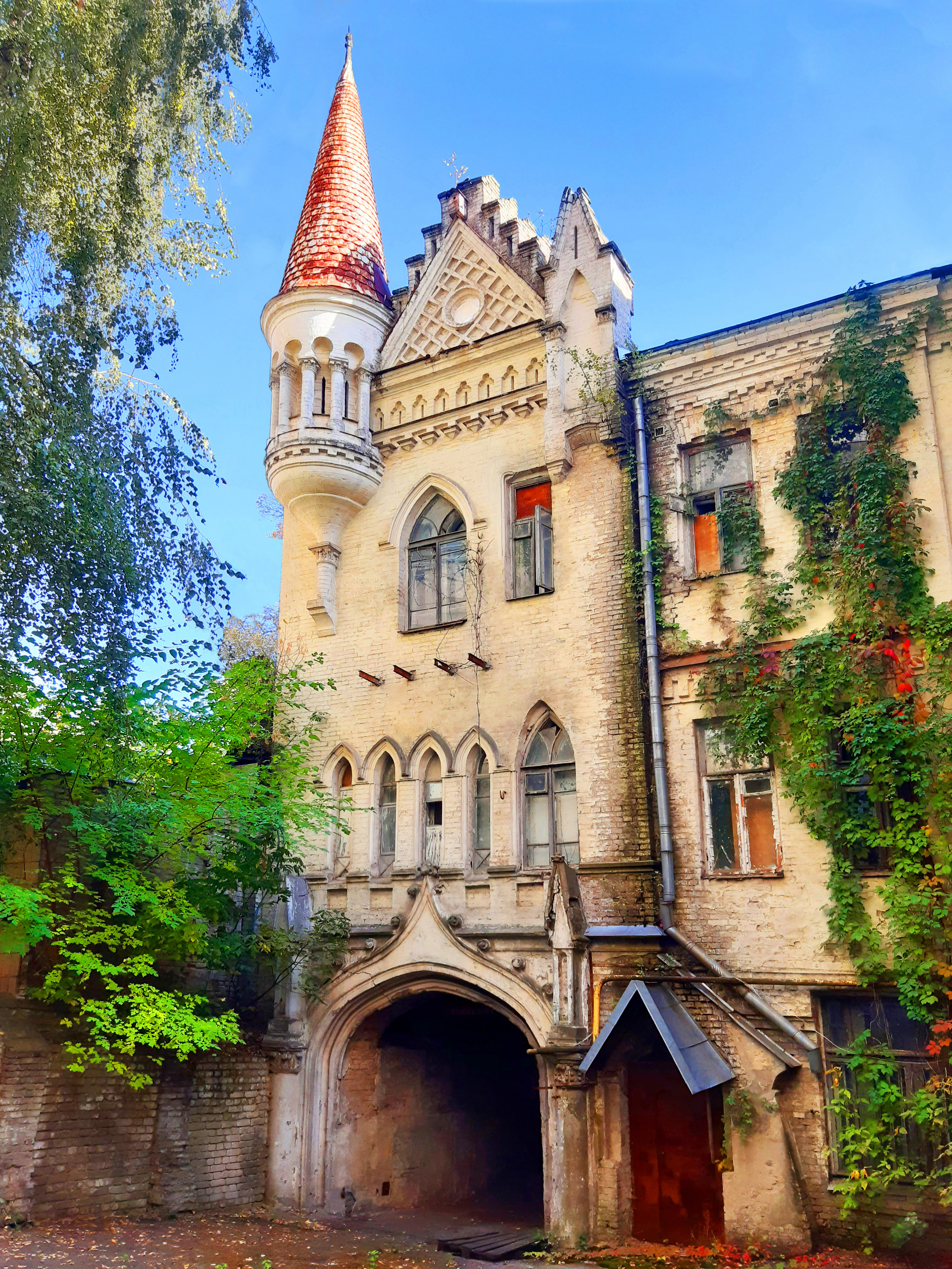 Флігель житловий, вул. Бульварно-Кудрявська, 27-Б, Київ